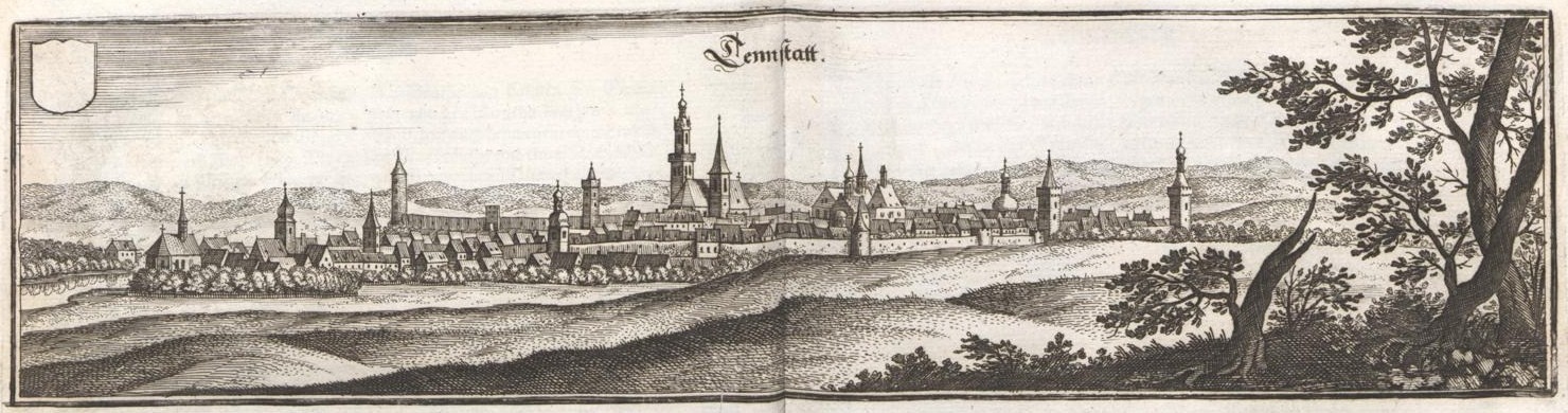 Bad Tennstedt nach einem Stich aus Merian um 1650.